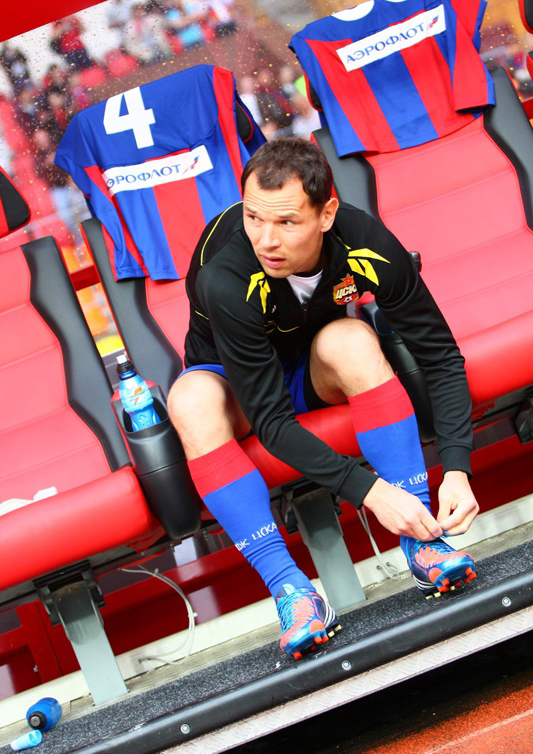 Сергей Игнашевич готовиться к игре.